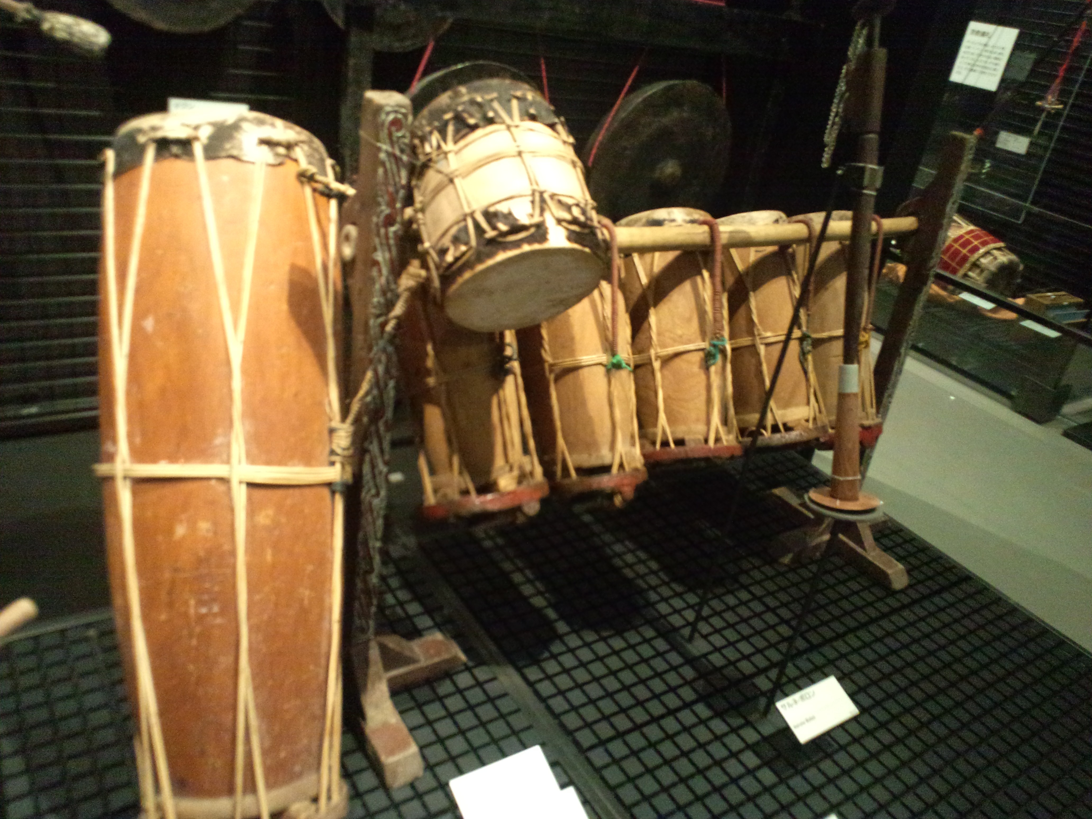 国立民族学博物館（大阪） ゴンダン・サバングナン（インドネシア、トバ・バタック、2005年収集）